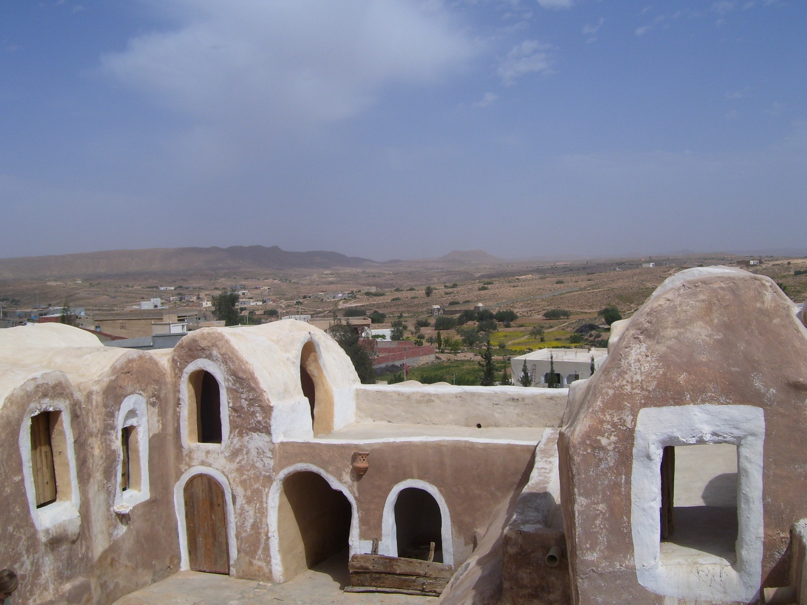 Village de Ksar Hadada en Tunisie